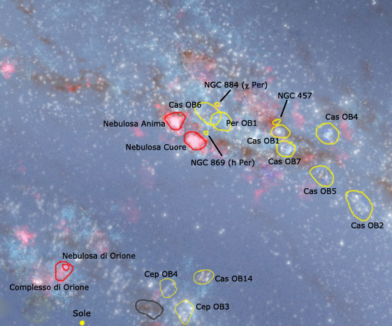 Mappa del Complesso del Cigno